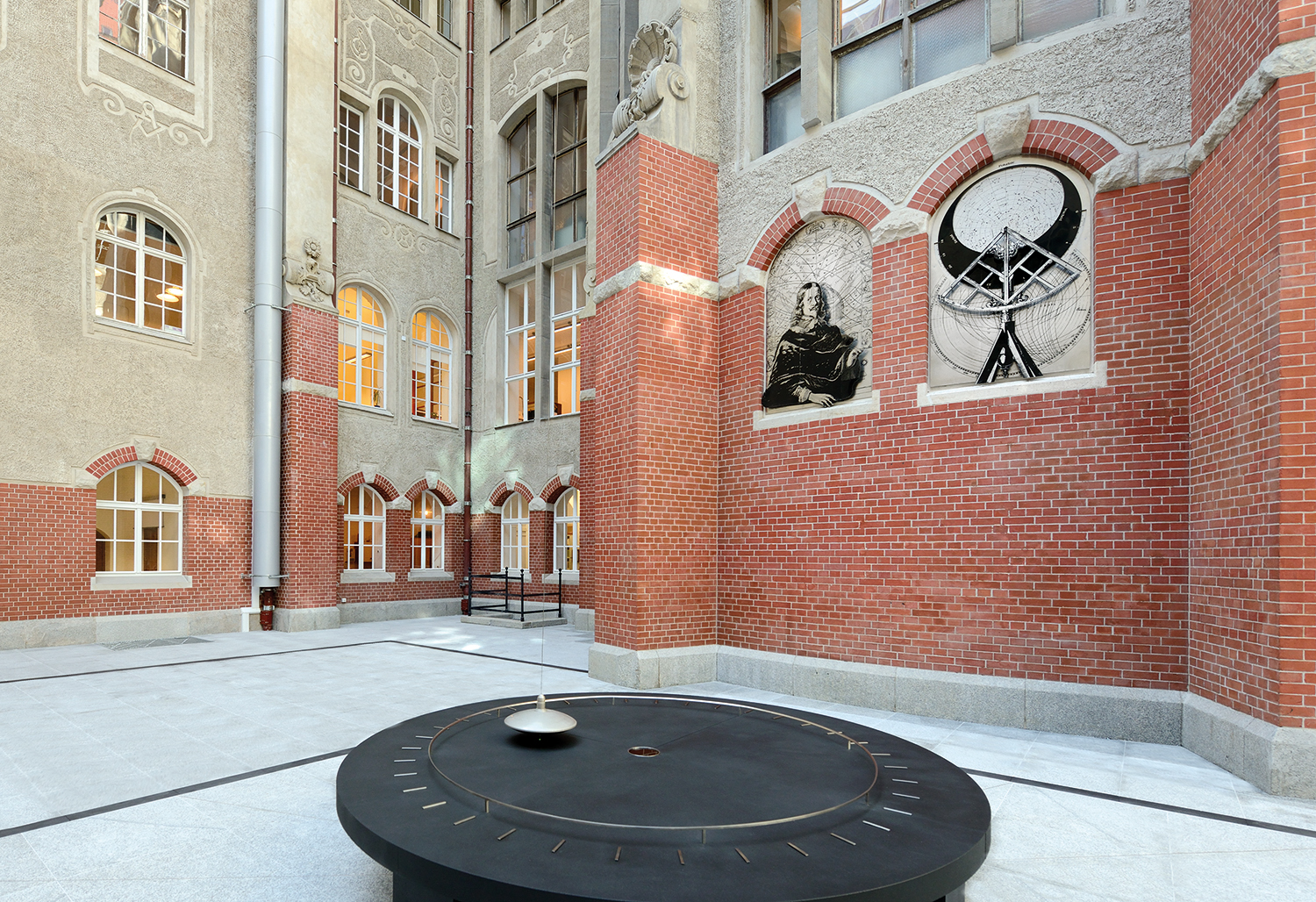 Wahadło Foucaulta na dziedzińcu im. Jana Heweliusza. Gmach Główny PG.